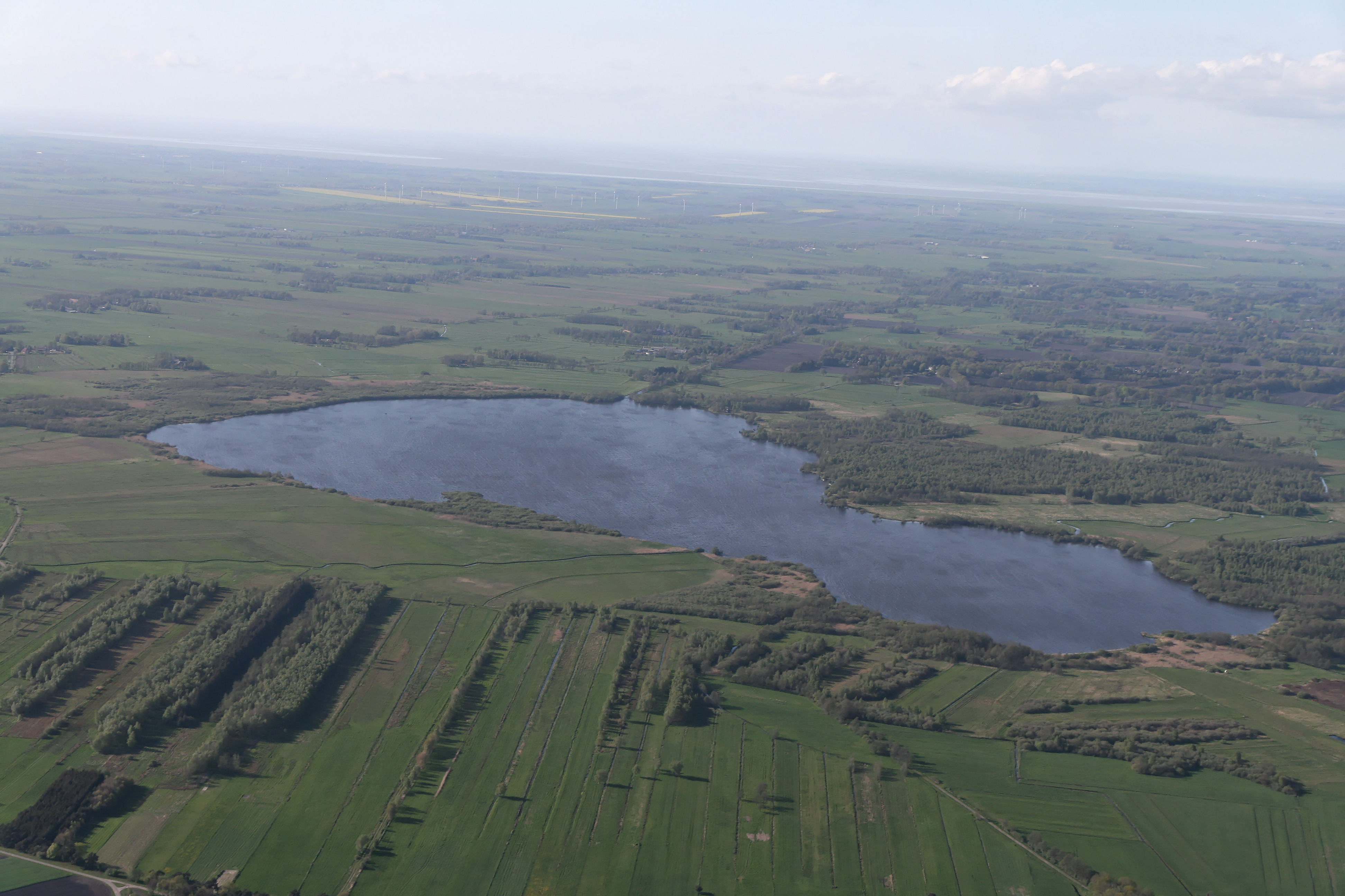 Luftaufnahme des Balksees im Landkreis Cuxhaven, Niedersachsen (Deutschland)